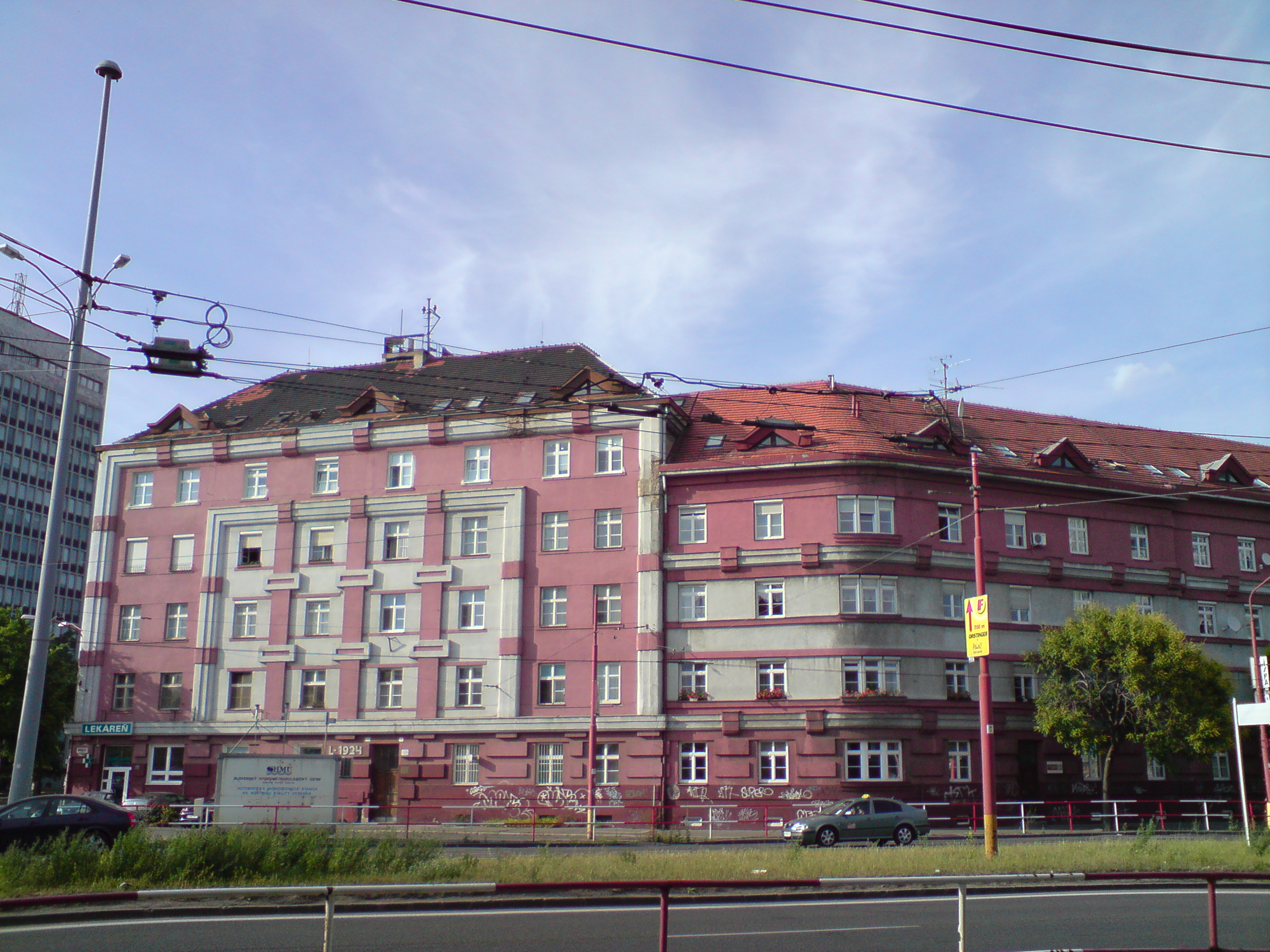 Trnavské mýto